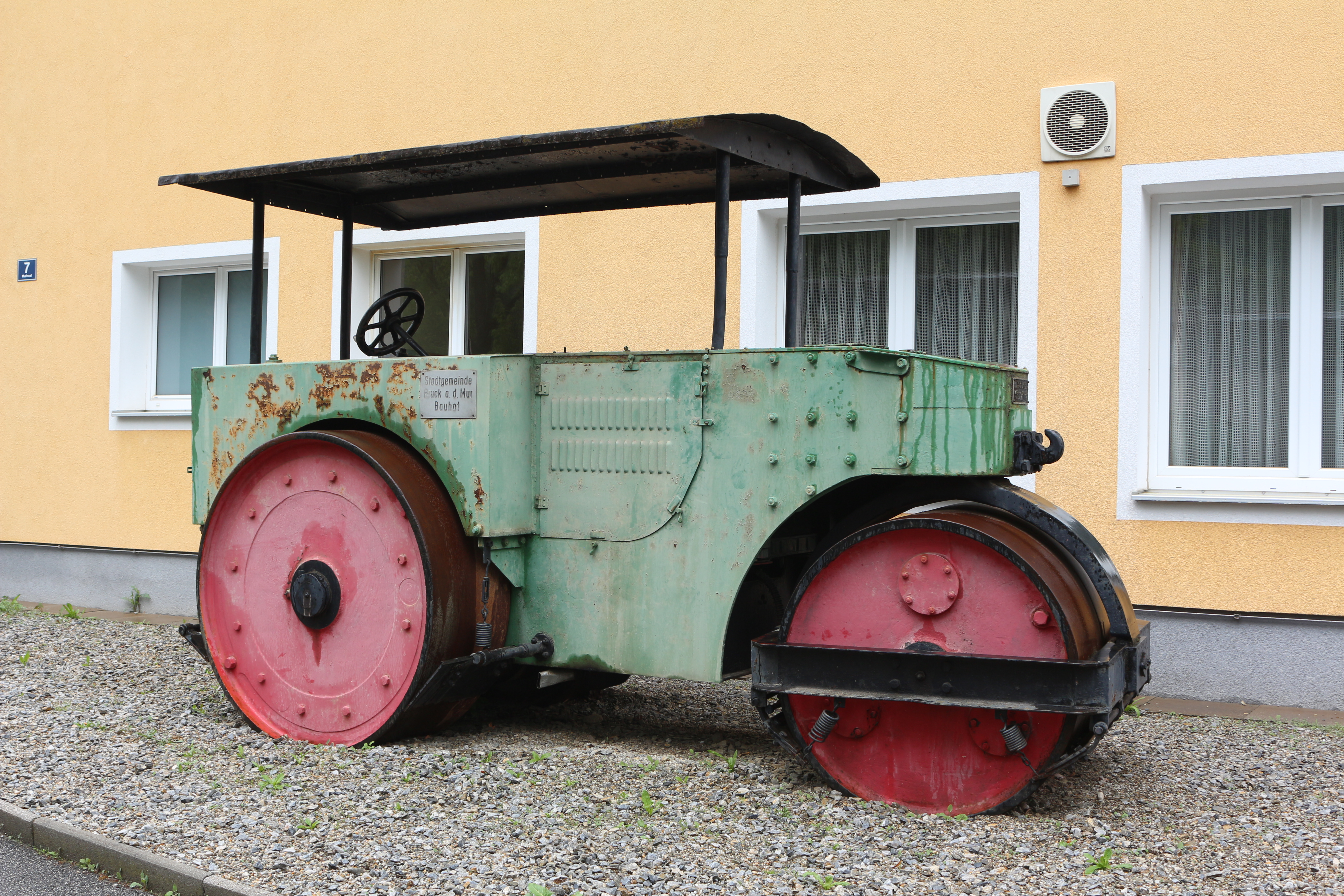 Ein Fahrzeug der Wiener Lokomotiv-Fabriks-Aktien-Gesellschaft mit der No. 246 aus dem Jahr 1938 vor dem Bauhof der Stadtgemeinde Bruck an der Mur.